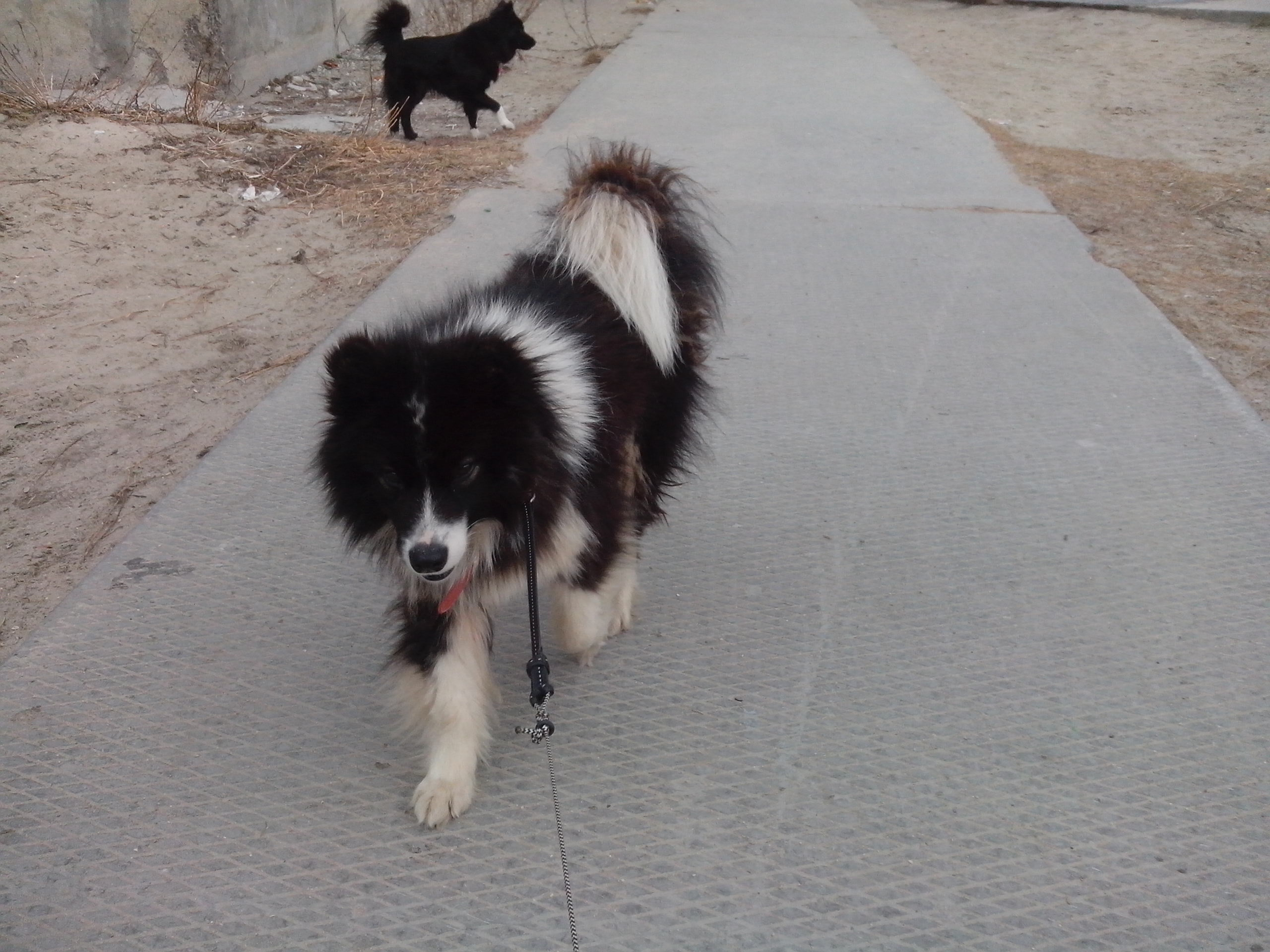 ненецкая оленегонная лайка, оленегонка, ненецкая лайка